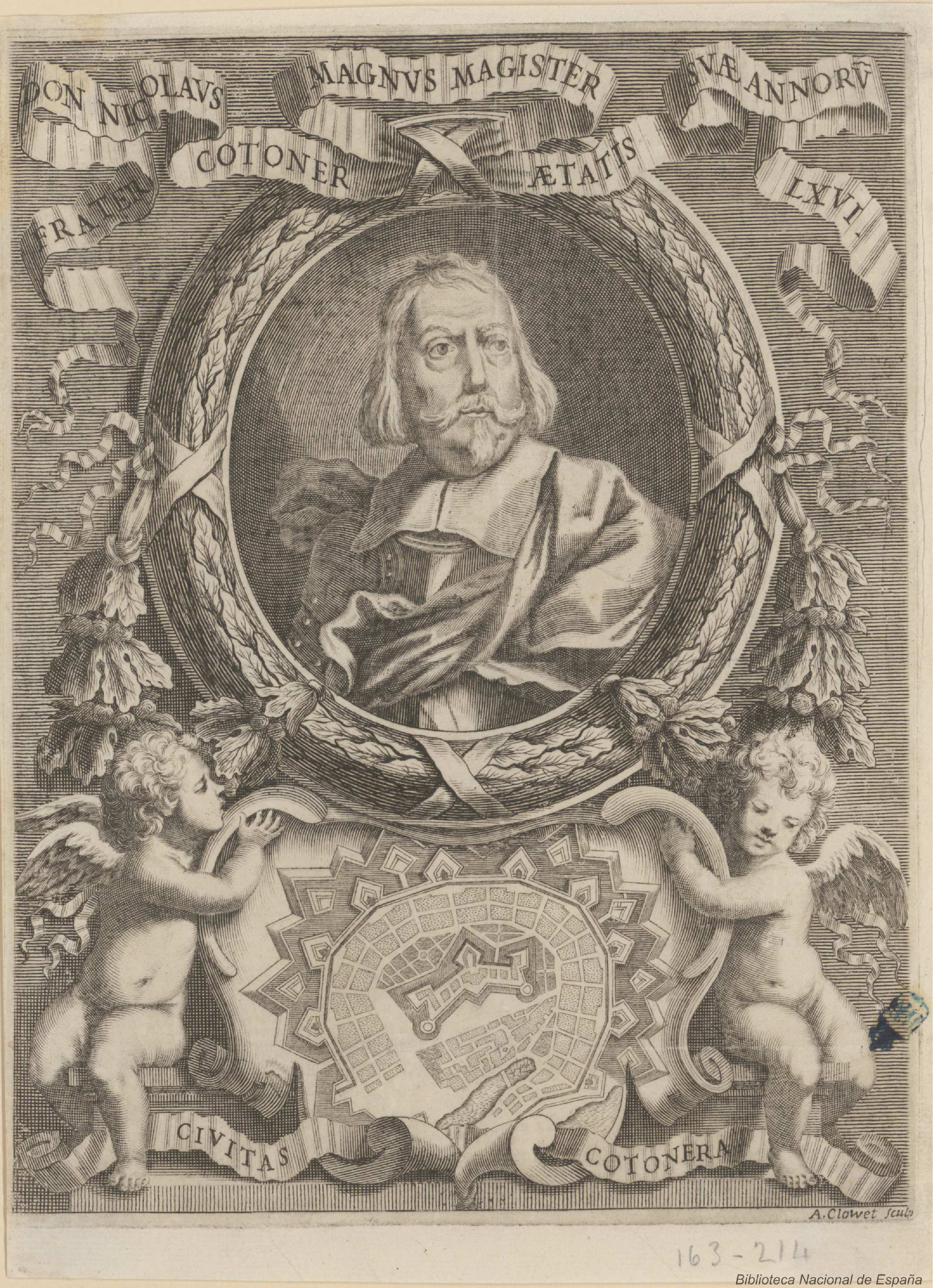 Nicolás Cotoner y Oleza, grabado calcográfico de Albert Clouwet, Biblioteca Nacional de España. Inscripción: FRATER DON NICOLAVS COTONER, MAGNVS MAGISTER AETATIS SVAE ANNORVM LXVI.// CIVITAS COTONERA